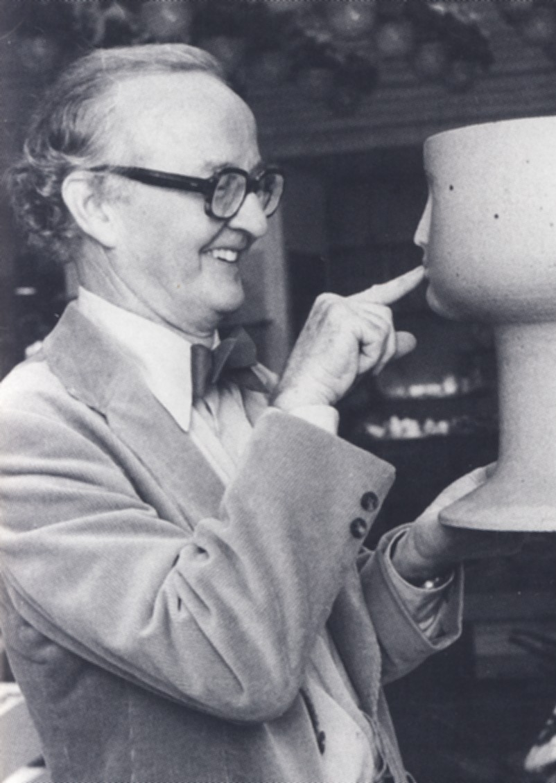 Stig Lindberg